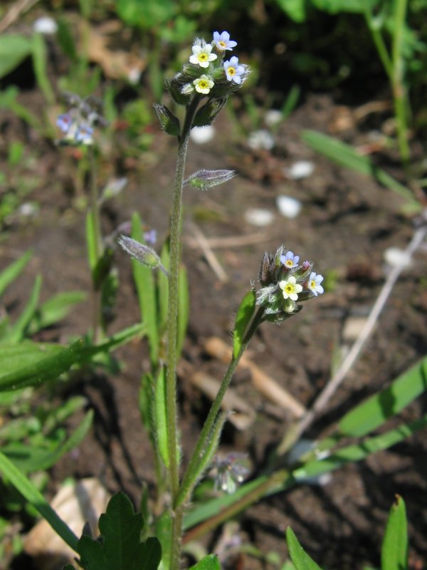 Farbwechselndes Vergissmeinnicht Myosotis discolor, Rügen